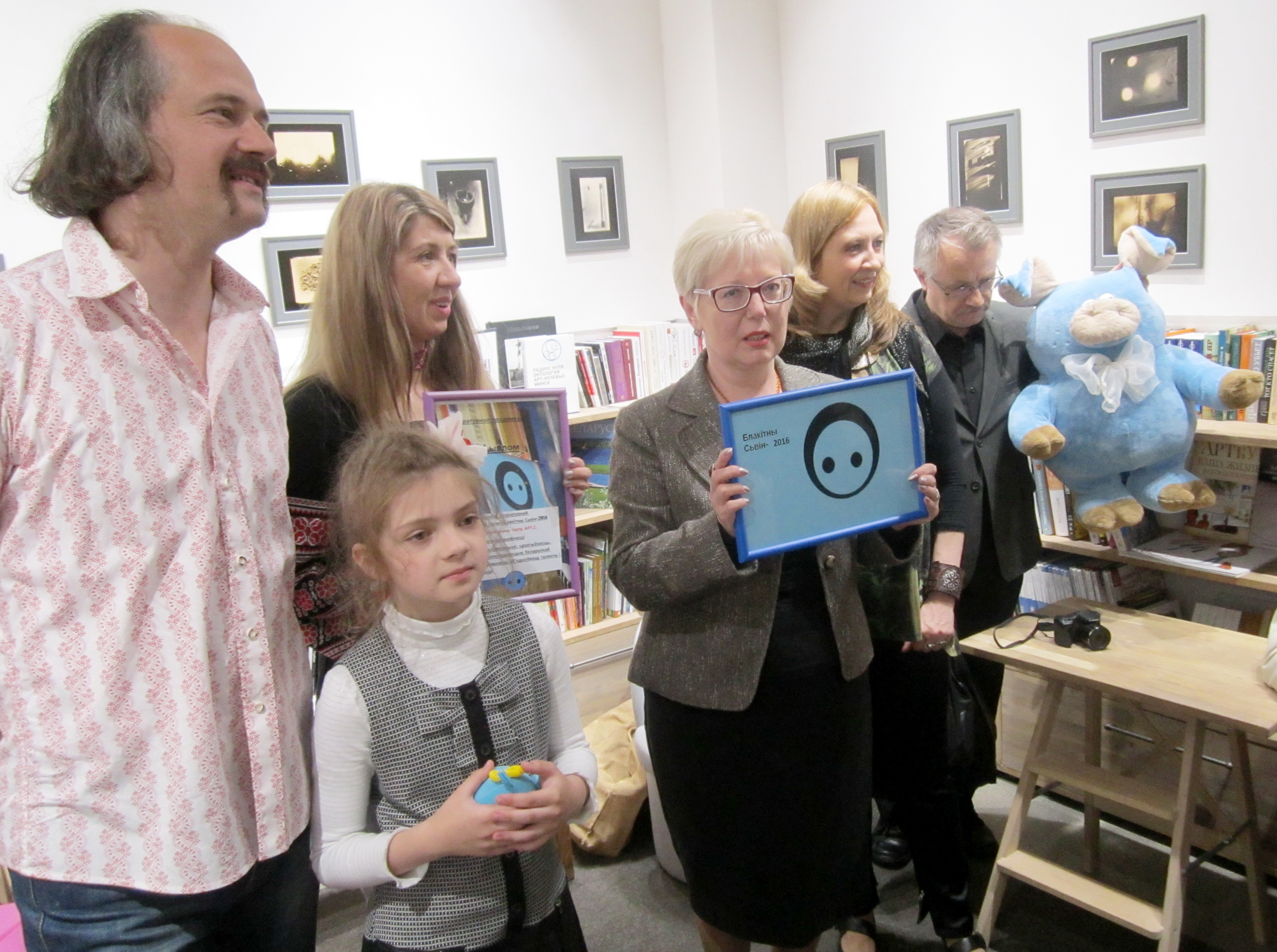 Узнагароджанне лаўрэатаў на "Блакітны Свін - 2016"